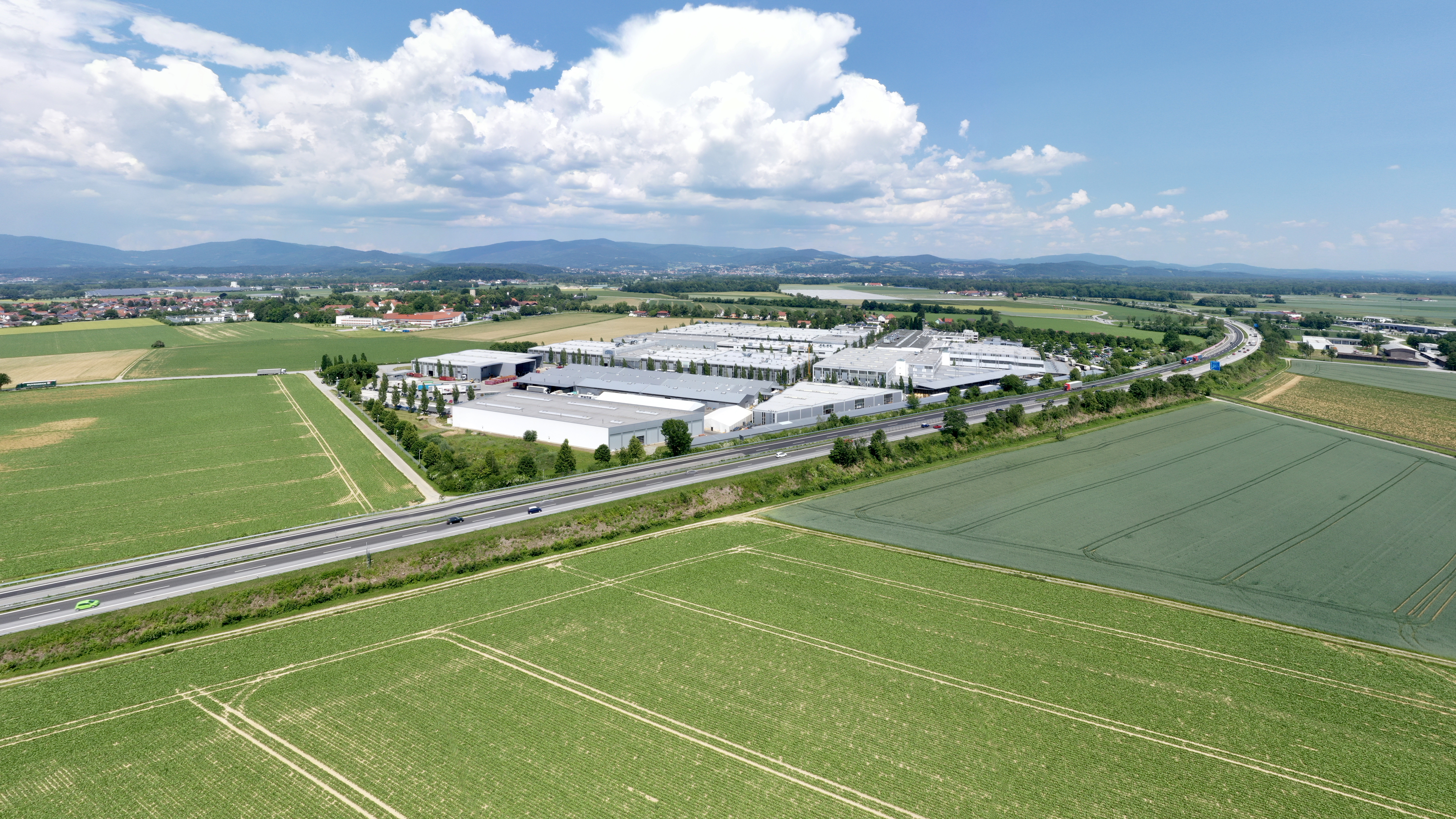 Luftbild der Kermi GmbH in Pankofen/Plattling